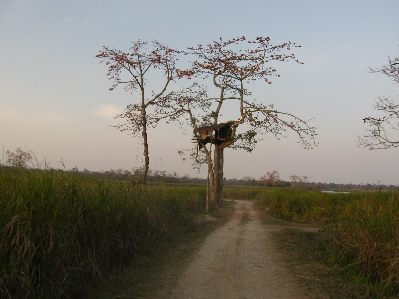 Inside Kaziranga national park, Assam, India.